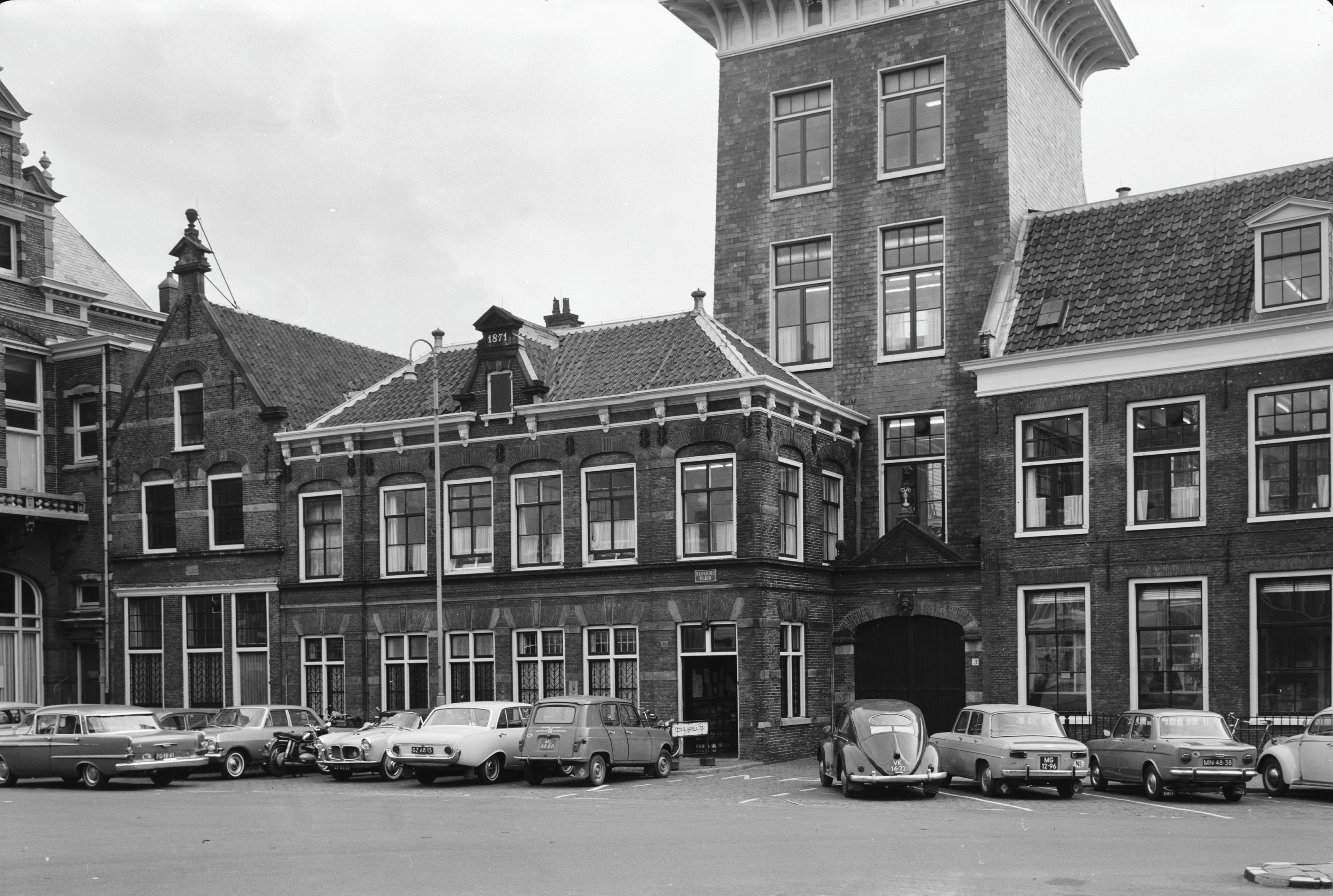 gevels